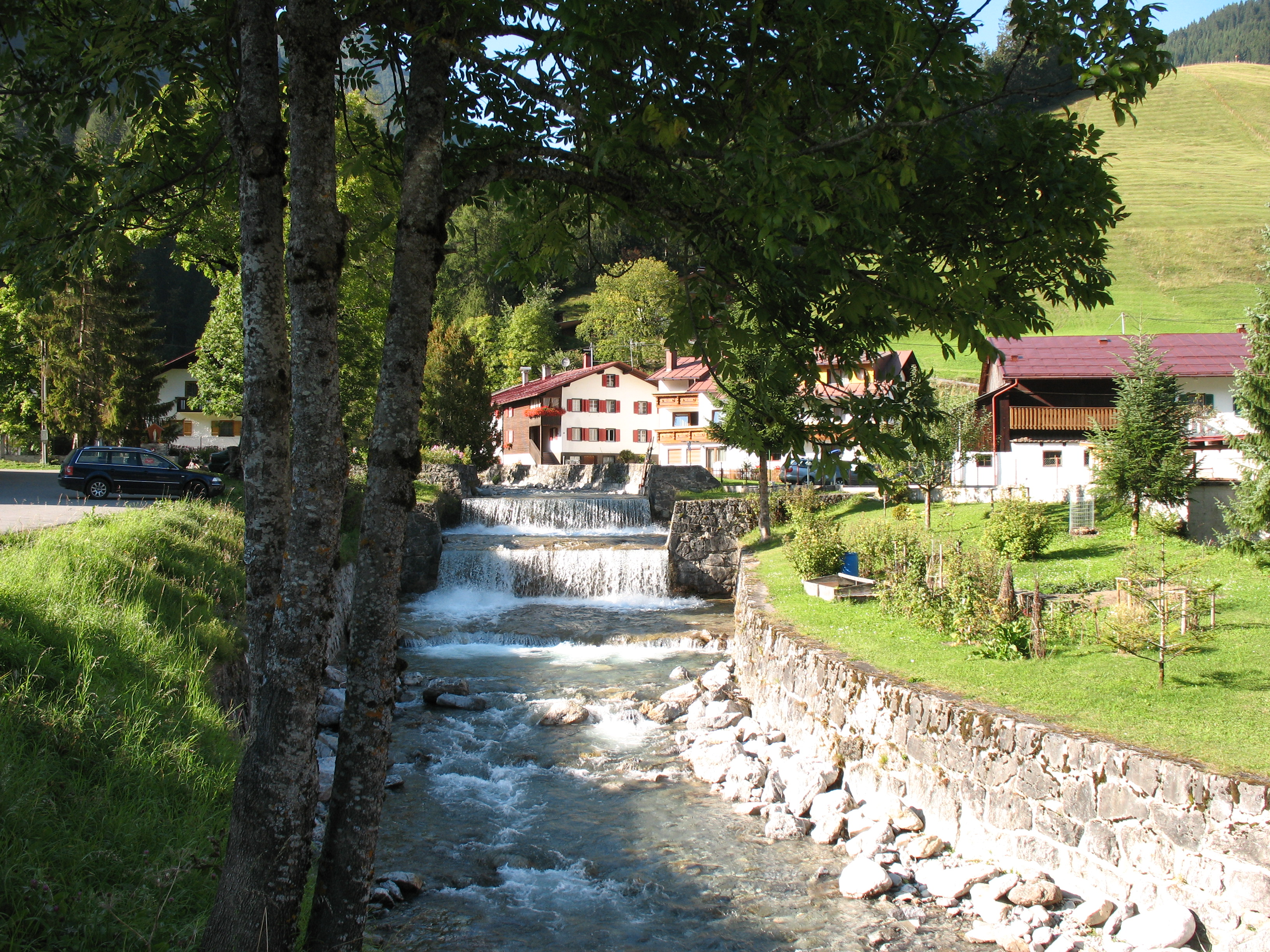 Der Höhenbach im Ortsbereich von Holzgau.